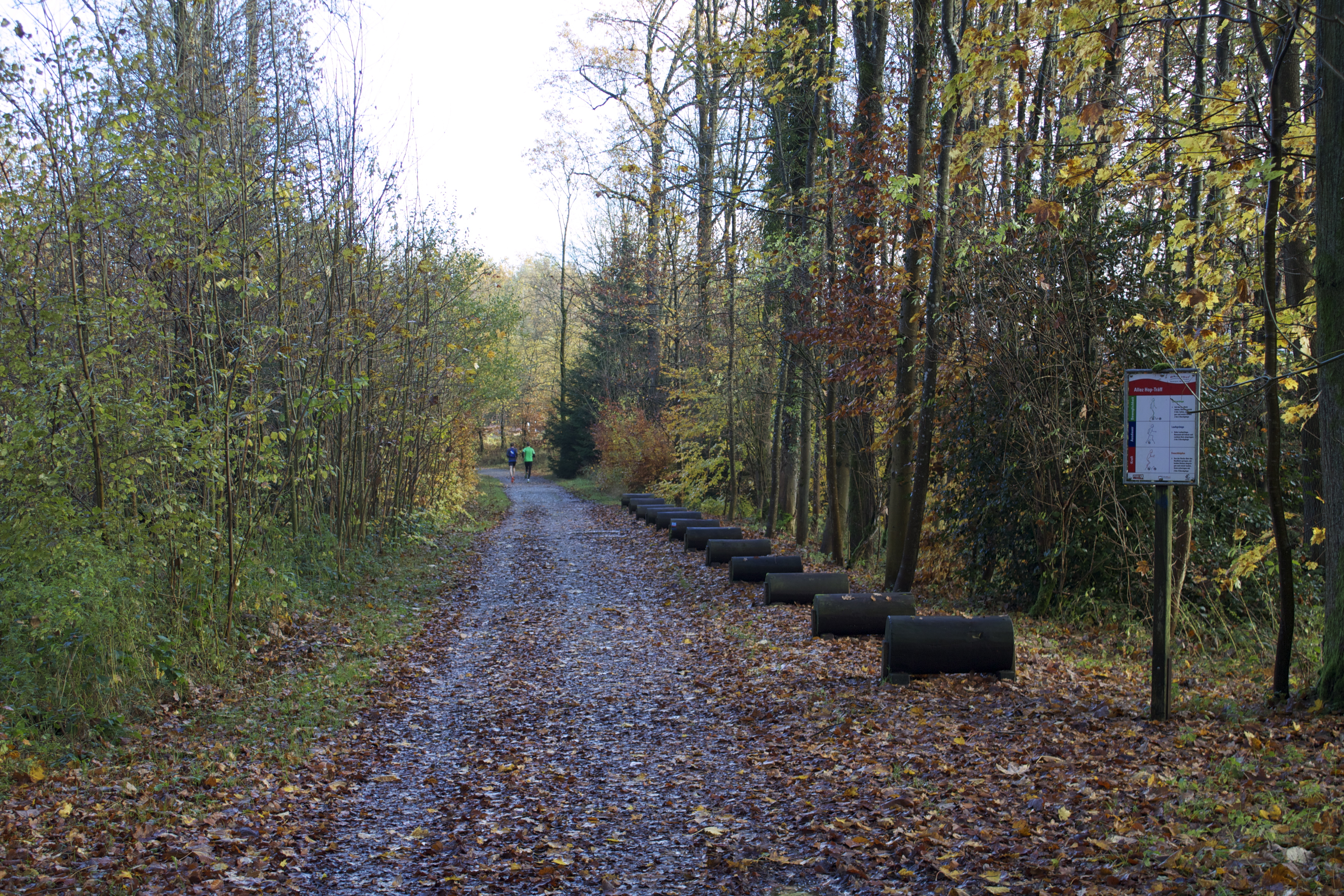 Bremgartenwald